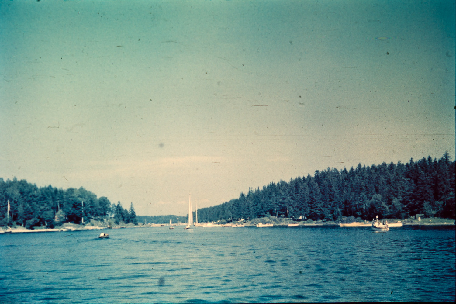 Bildet er hentet fra Arkivverket. Middagsbukta i Oslofjorden, egentlig Langårsundet, et smalt sund mellom Brønnøya og Langåra i Vestfjorden i Asker. Denne delen av fjorden kalles Bærumsbassenget Fotograf: Thomas Neumann År: 1937 Kamera: Leica Film: Agfa color neu Arkivreferanse: PA1456Ub1_1_2_22 Arkivinstitusjon : Riksarkivet Arkivnavn : Neumann, Thomas Sted : Norge, Akerhus, Bærum, Emneord: Sjø Avbildet